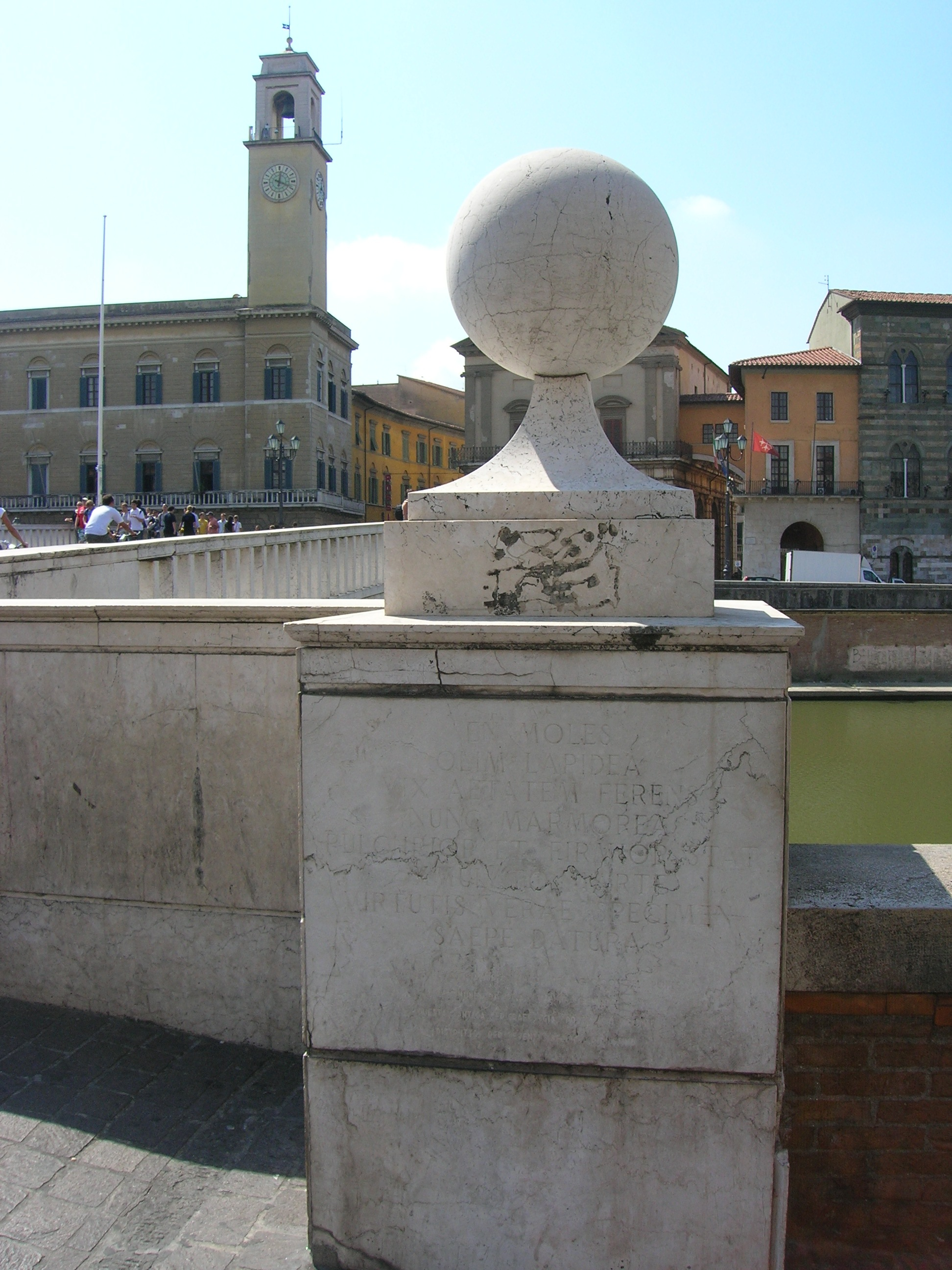 Pisa - Ponte di Mezzo - Una delle sfere con lapide